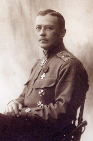 генерал-майор В. П. Разгильдеев